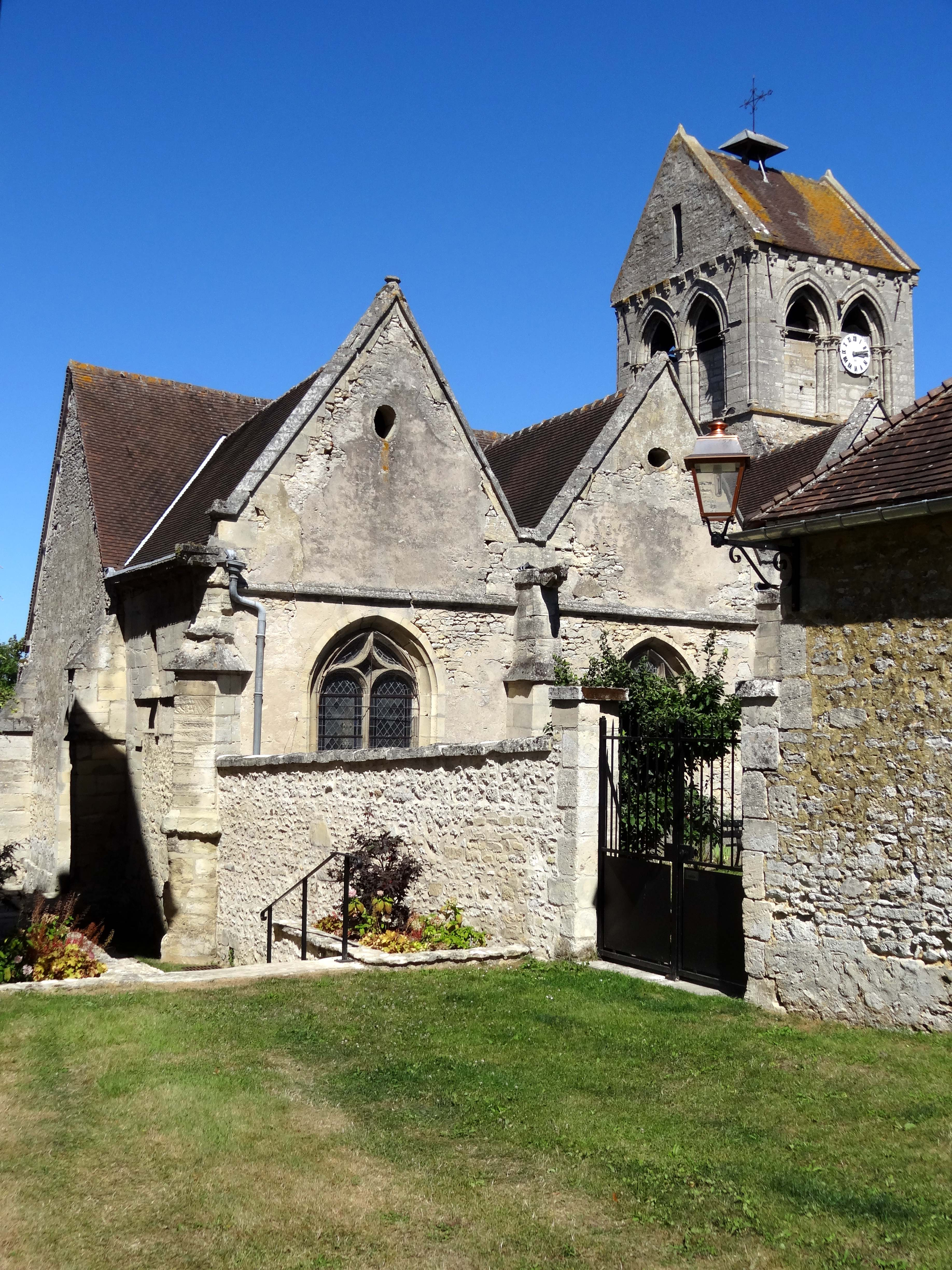 Église Saint-Gervais-et-Saint-Protais de Vaudancourt - voir titre.